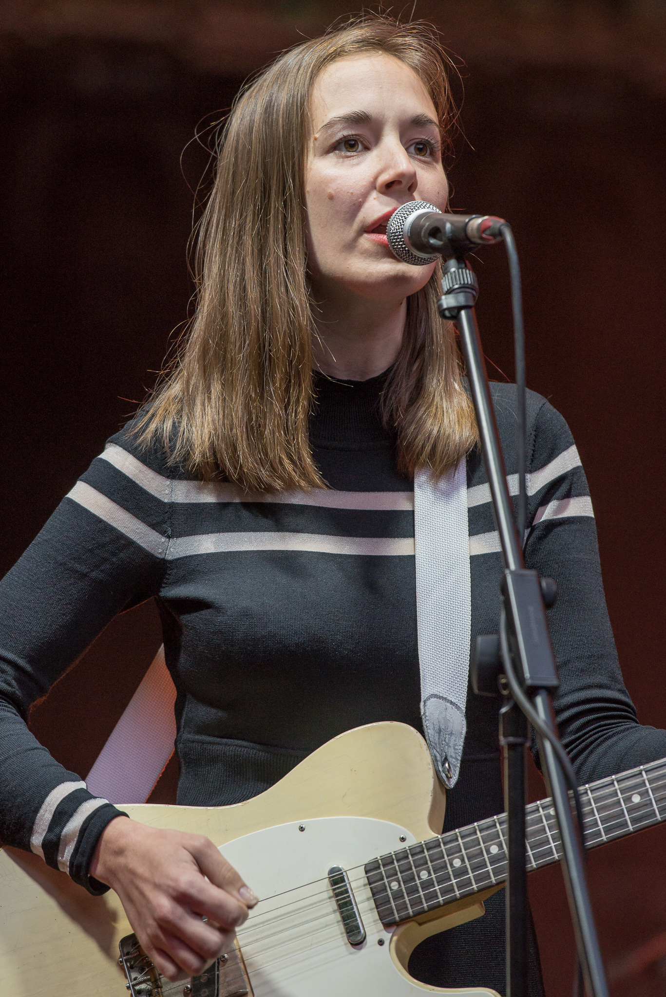 Concertbüro Franken,Konzert,Livekonzert,Livemusik,Margaret Glaspy,Musik,Serenadenhof